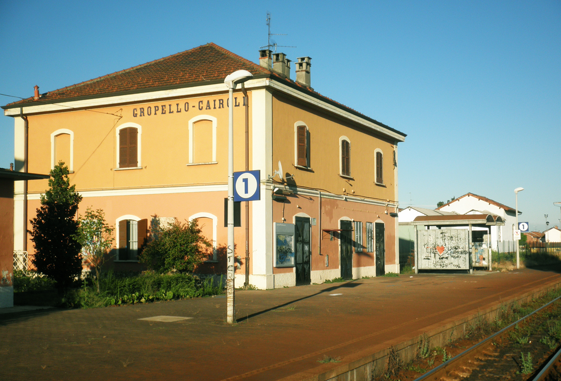 Stazione ferroviaria di Gropello Cairoli.